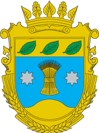 Герб Березнегуватського району